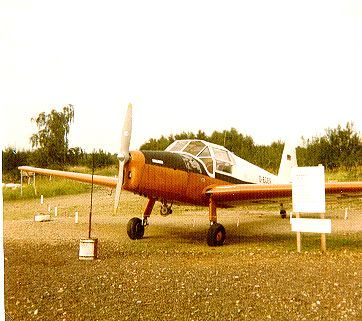 Bücker Bü 181 B1 bei einer Luftfahrtschau auf dem Flughafen Köln-Bonn (heute Konrad Adenauer), 1975